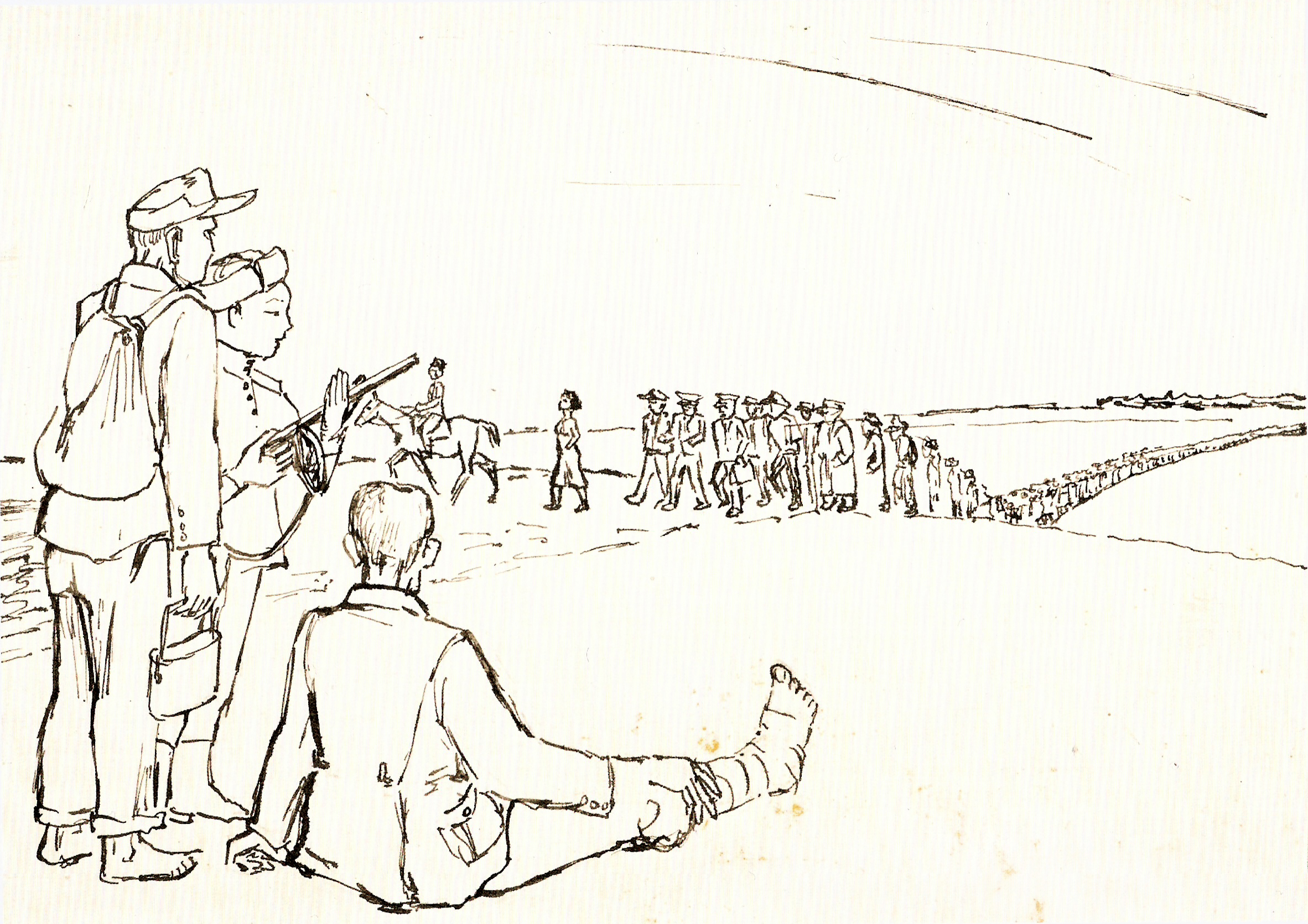 Zug der Kriegsgefangenen (Zeichnung)